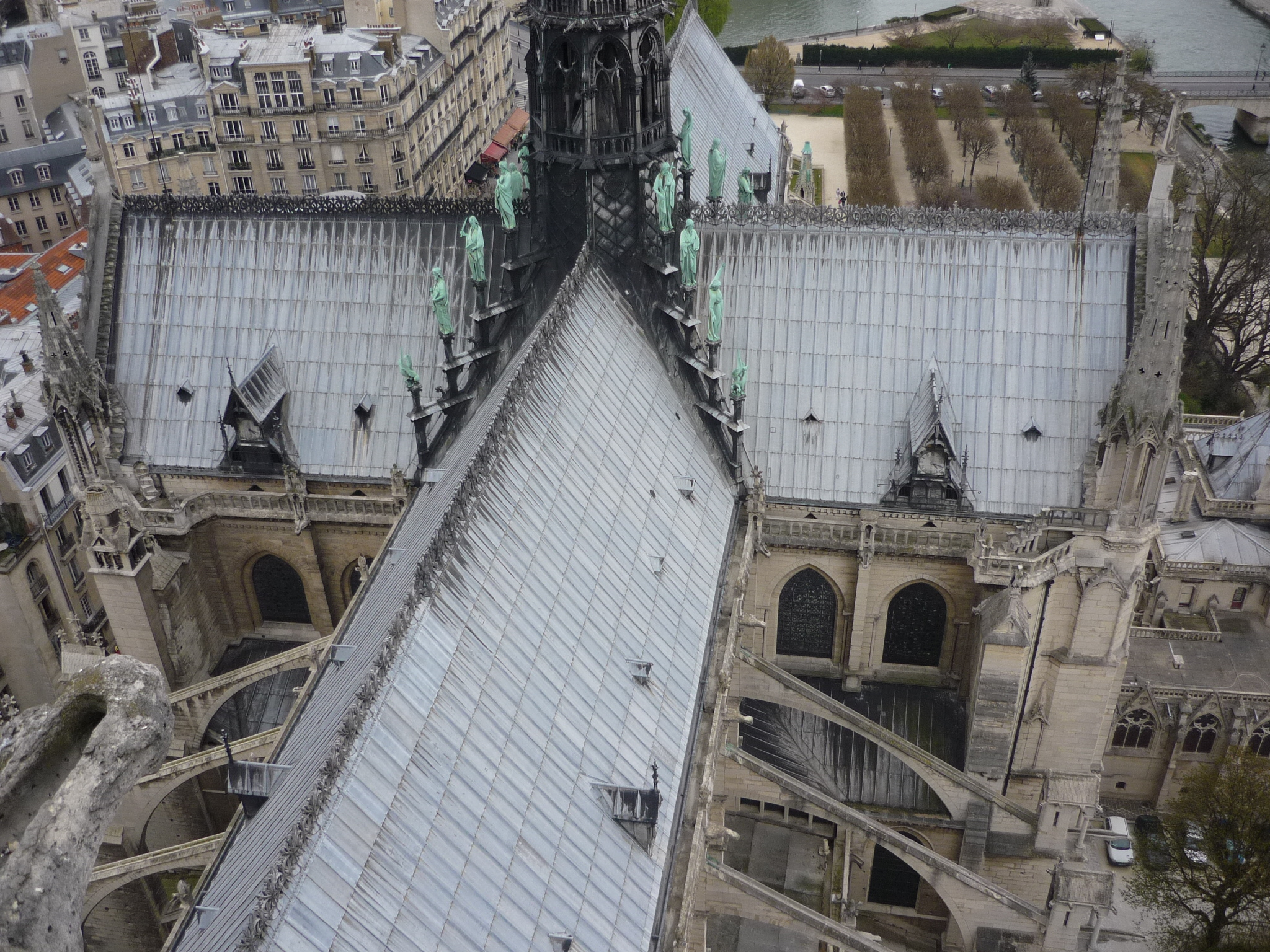 Das Dach von Notre Dame de Paris, Frankreich.